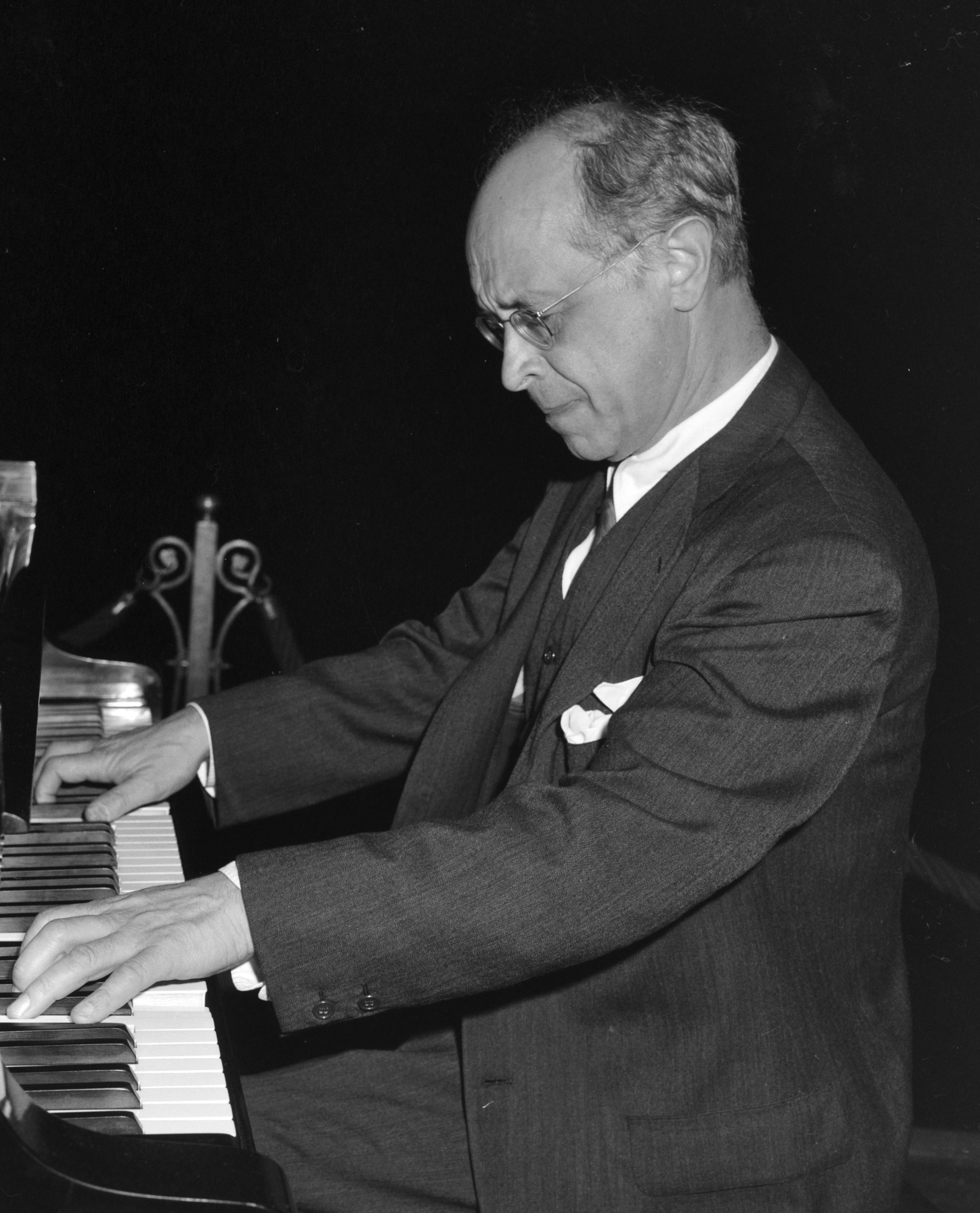 De meesterpianist Rudolf Serkin hier tijdens de repetitie in het Concertgebouw